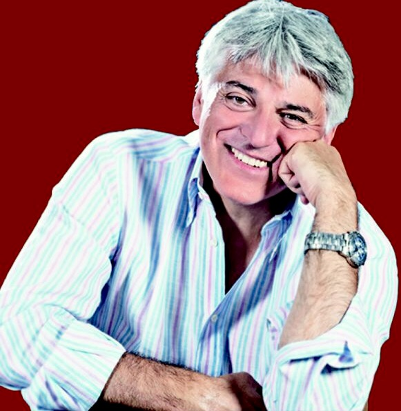 Ugo De Vita, autore e attore di prosa, docente